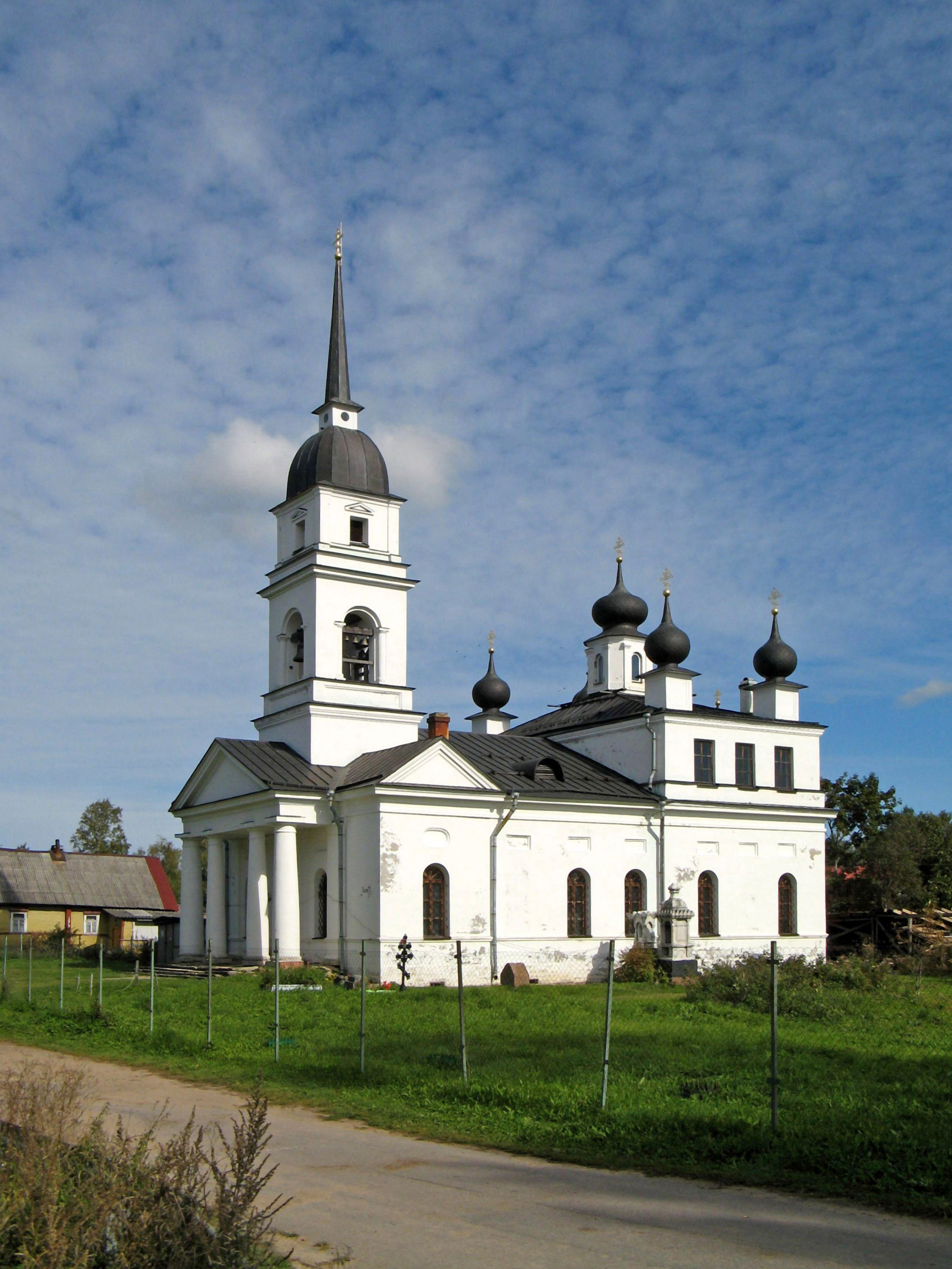 Никольская церковь (храм святителя Николая Чудотворца): Староладожский канал, 1 линия, 1Б, Кобона, Кировский район, Ленинградская область